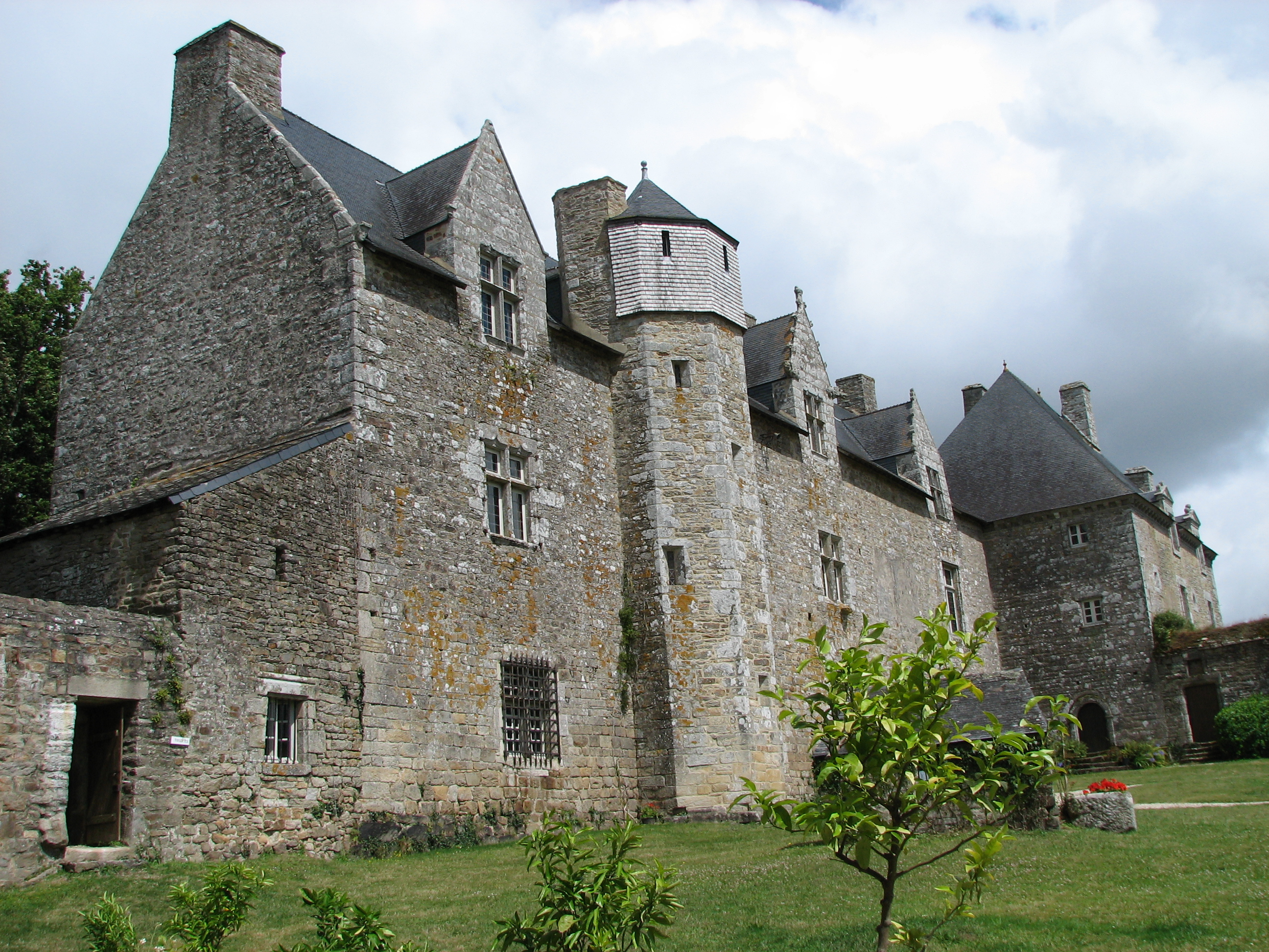 Château du Plessis-Josso